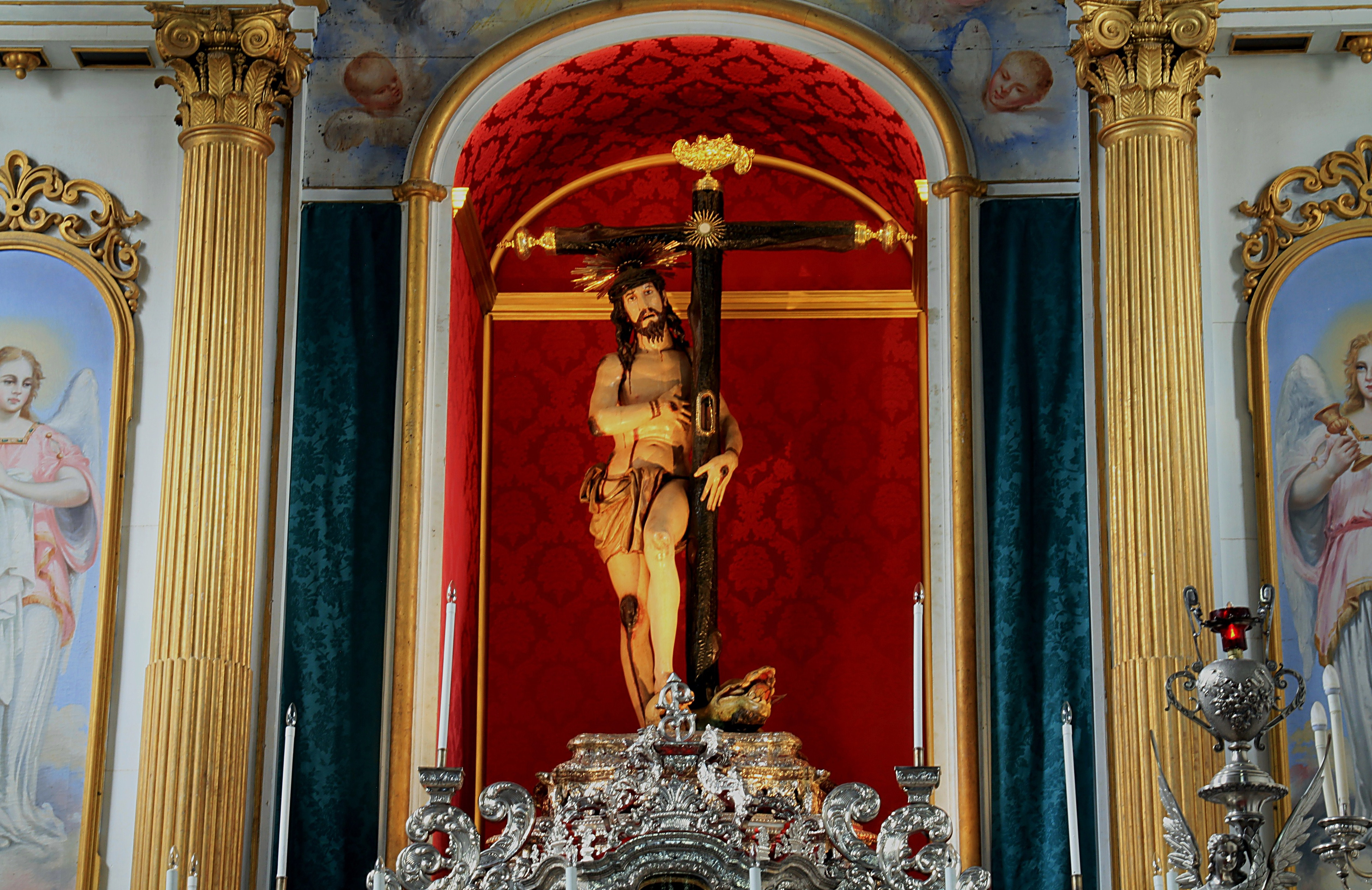 Santísimo Cristo de los Dolores y Agonía, retablo del altar mayor del Santuario del Cristo, Tacoronte. (Tenerife, Islas Canarias)